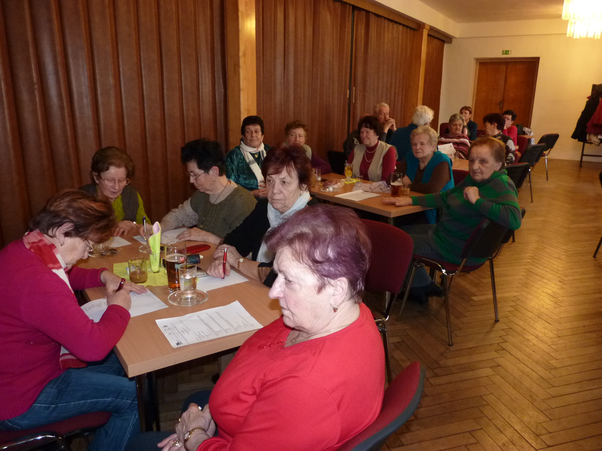 Senior klub